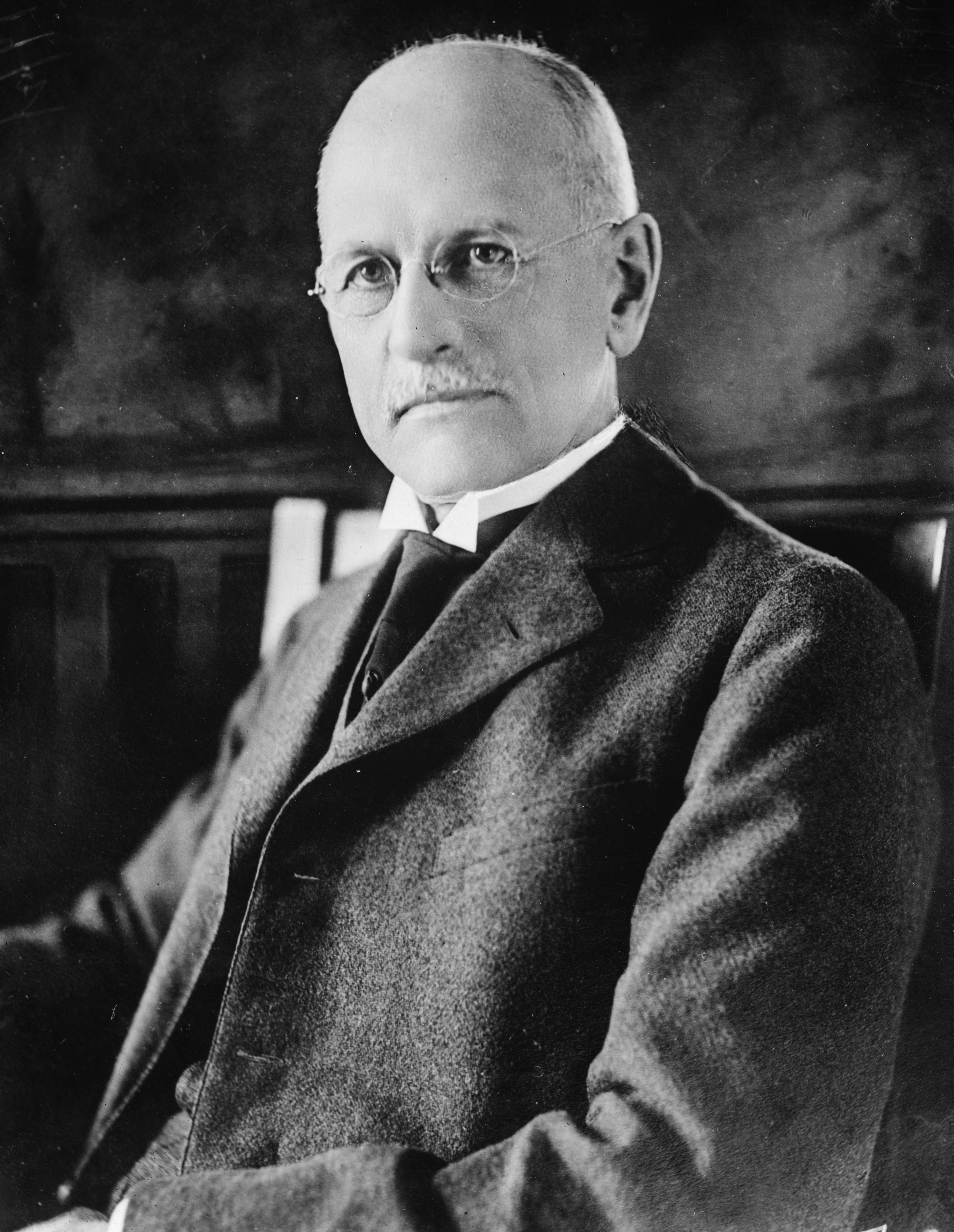 Ovington E. Weller, former U.S. Senator.